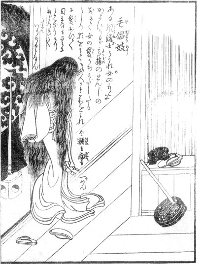 Kejōrō (毛倡妓) from the Konjaku Gazu Zoku Hyakki (今昔画図続百鬼)